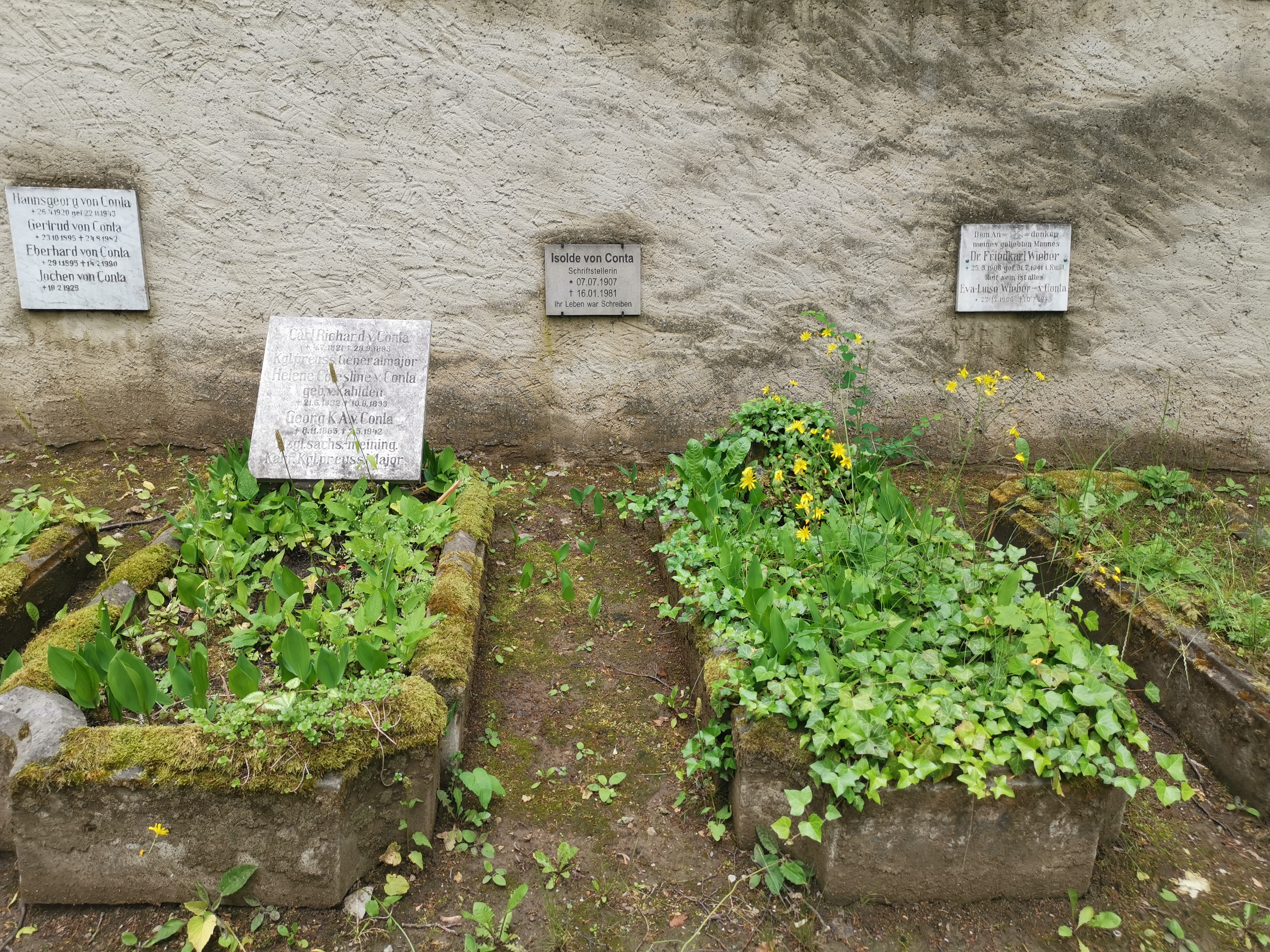 Grabstätte Familie Conta; Historischer Friedhof Weimar